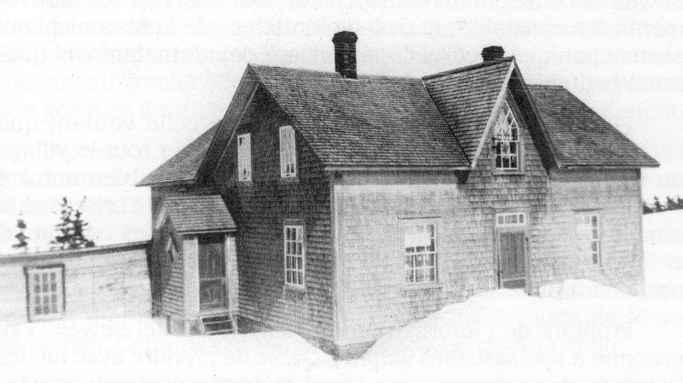 Hotel Sewell